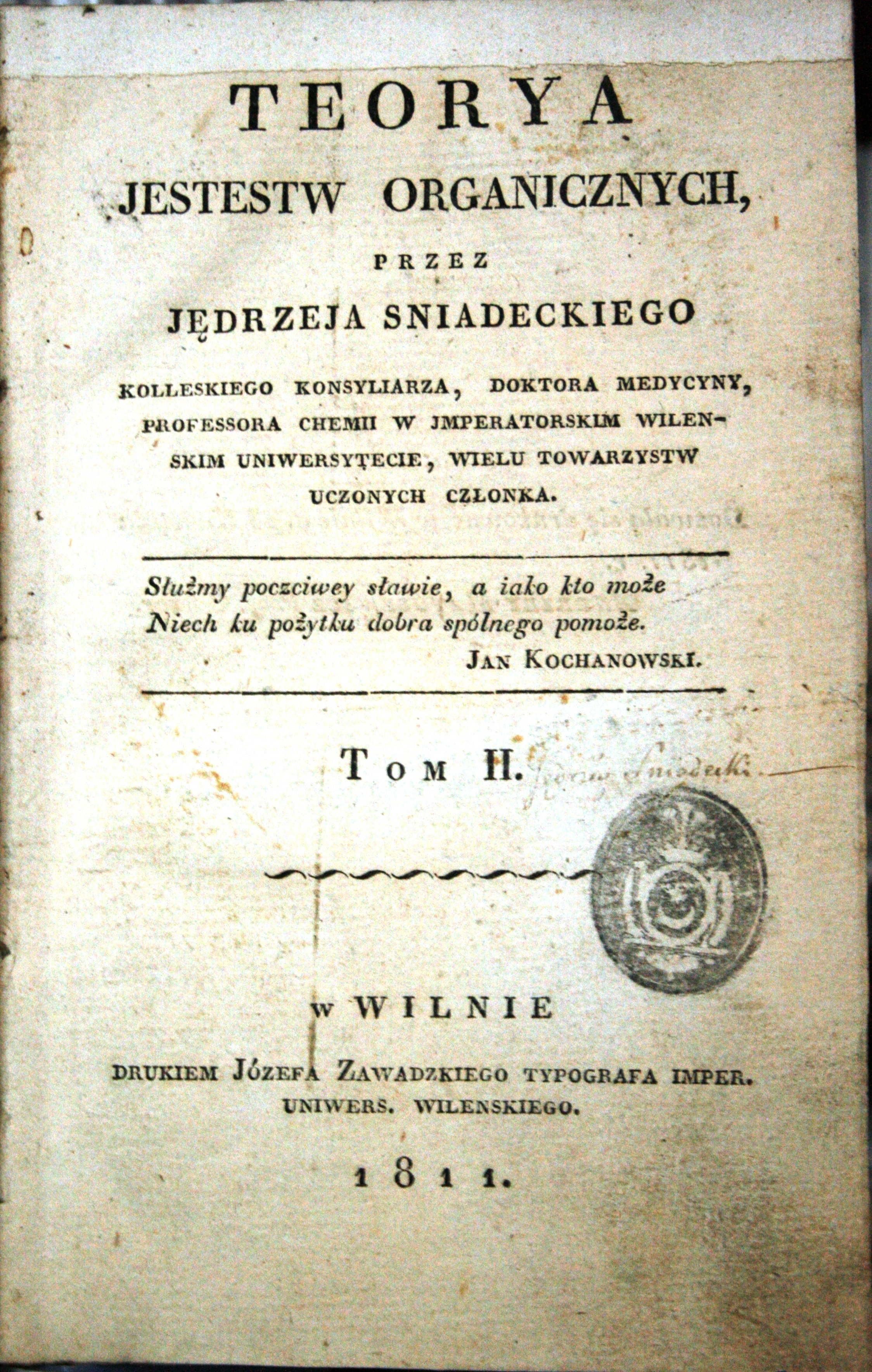 Śniadecki Jędrzej - Teorya jestestw organicznych - Tom II, strona tytułowa pierwszego wydania z 1811 roku